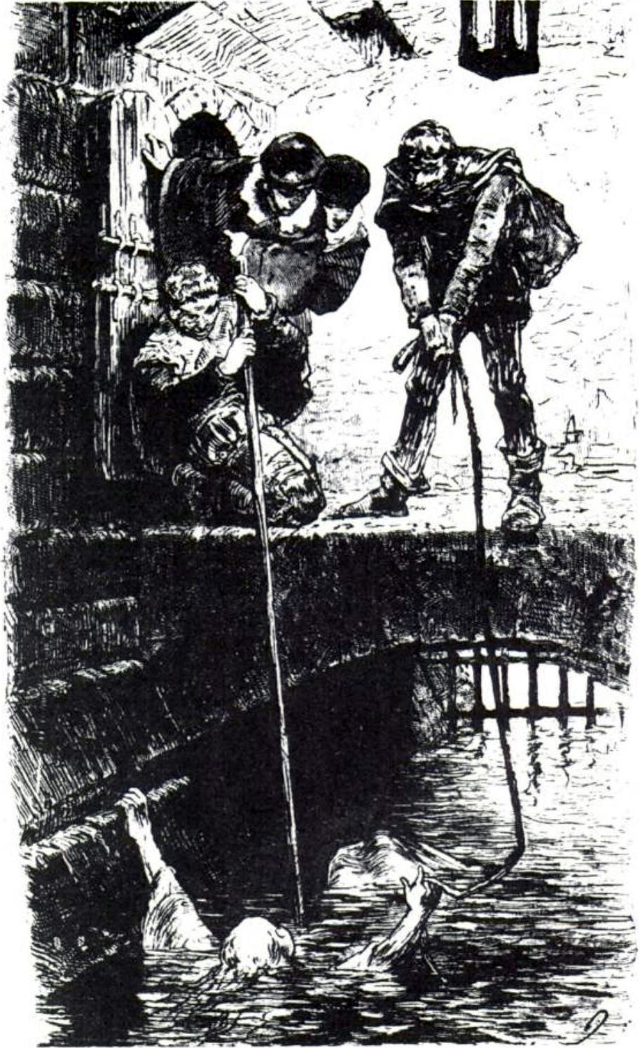 Die Hexenprobe. Zeichnung von G. Franz aus "Germania" von 1878.